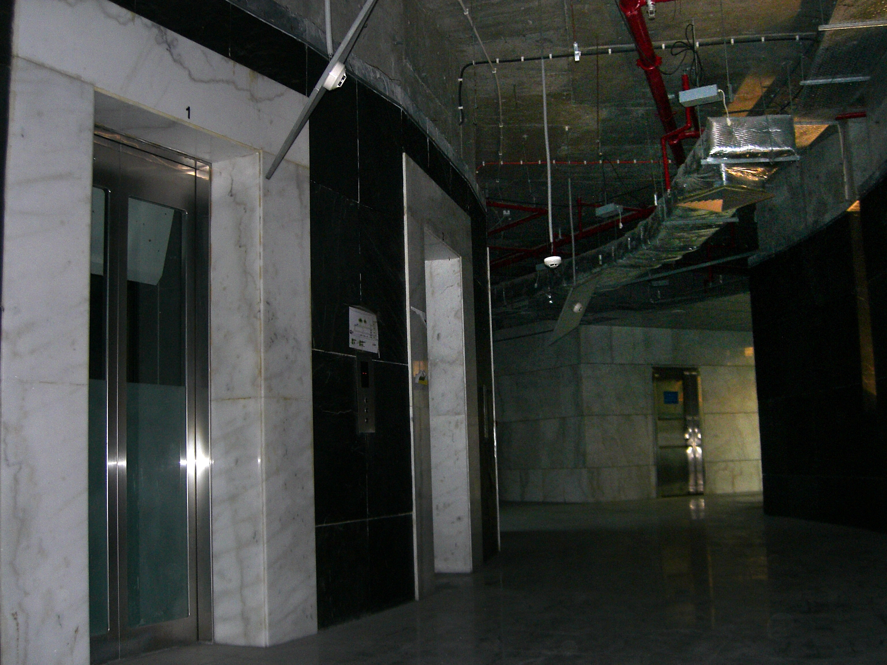 Centro de Praça de Ferreira do Amaral